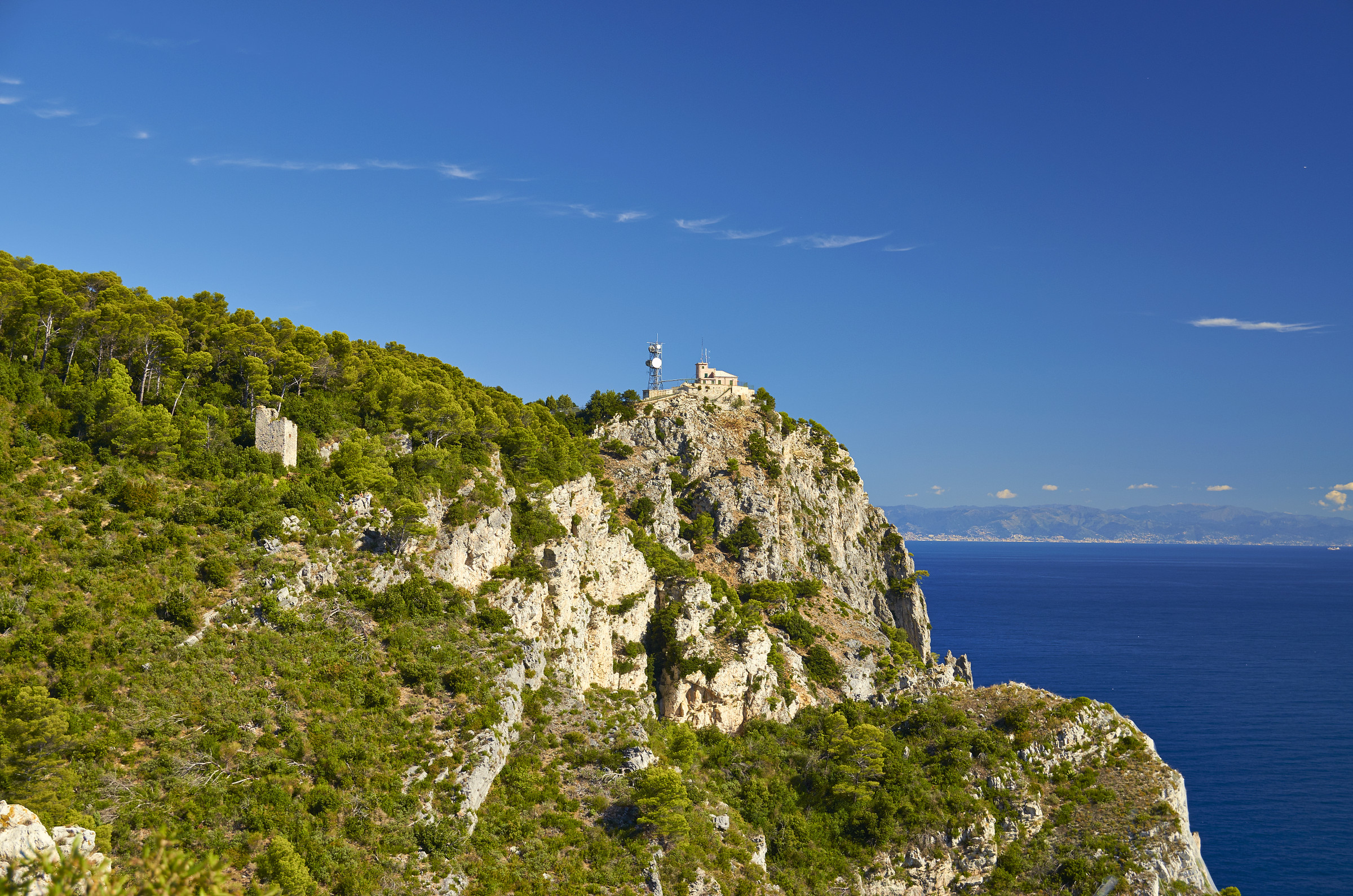 Il Semaforo di capo Noli